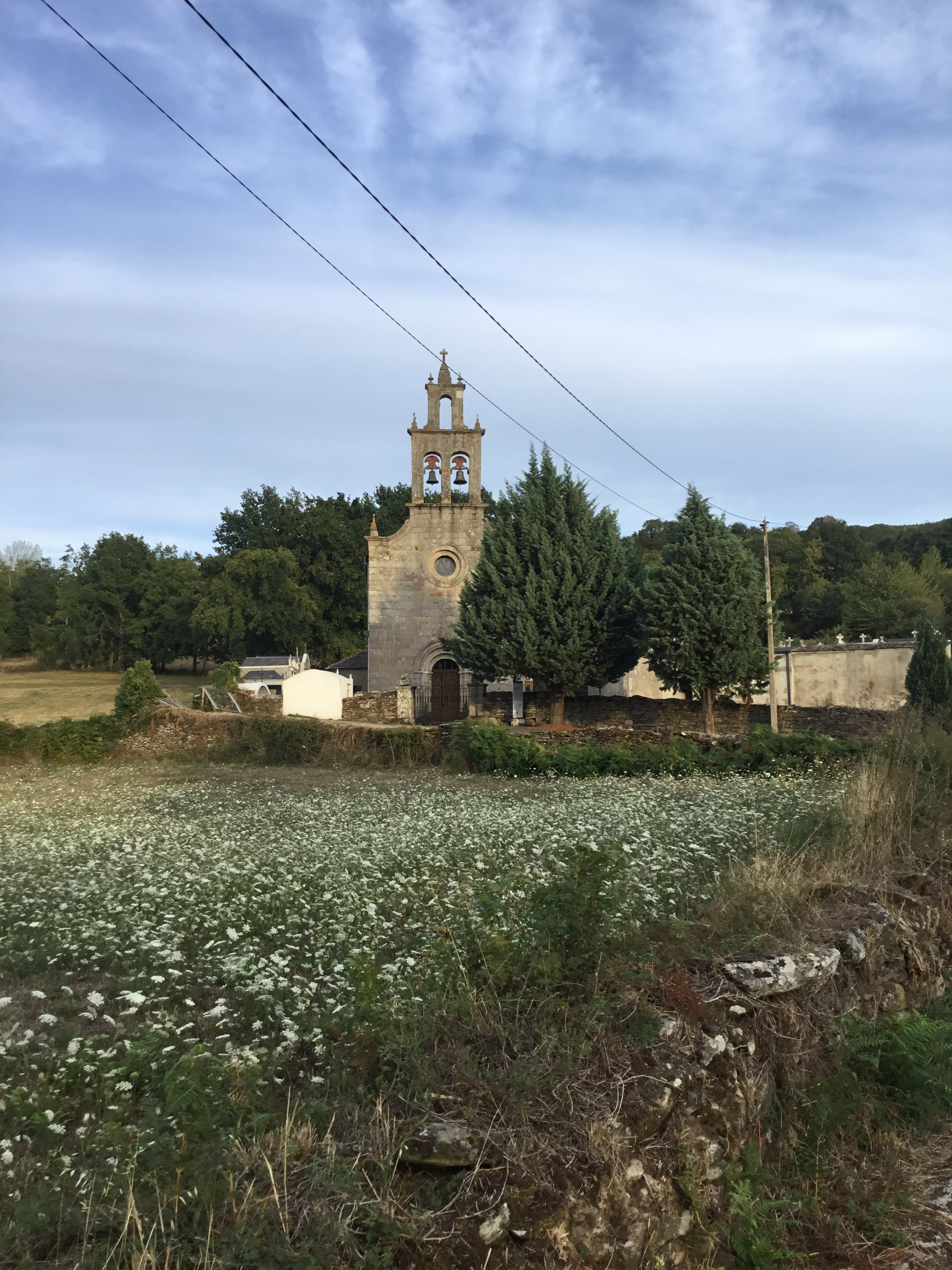 Iglesia de Santa Maria de Torbeo del siglo XII